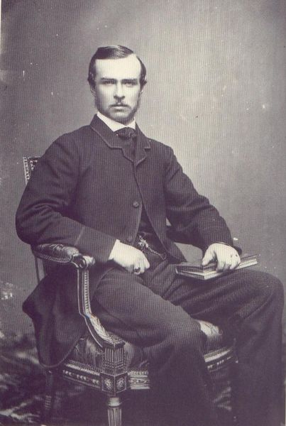 Großherzog Ludwig IV. von Hessen und bei Rhein (1837-1892)